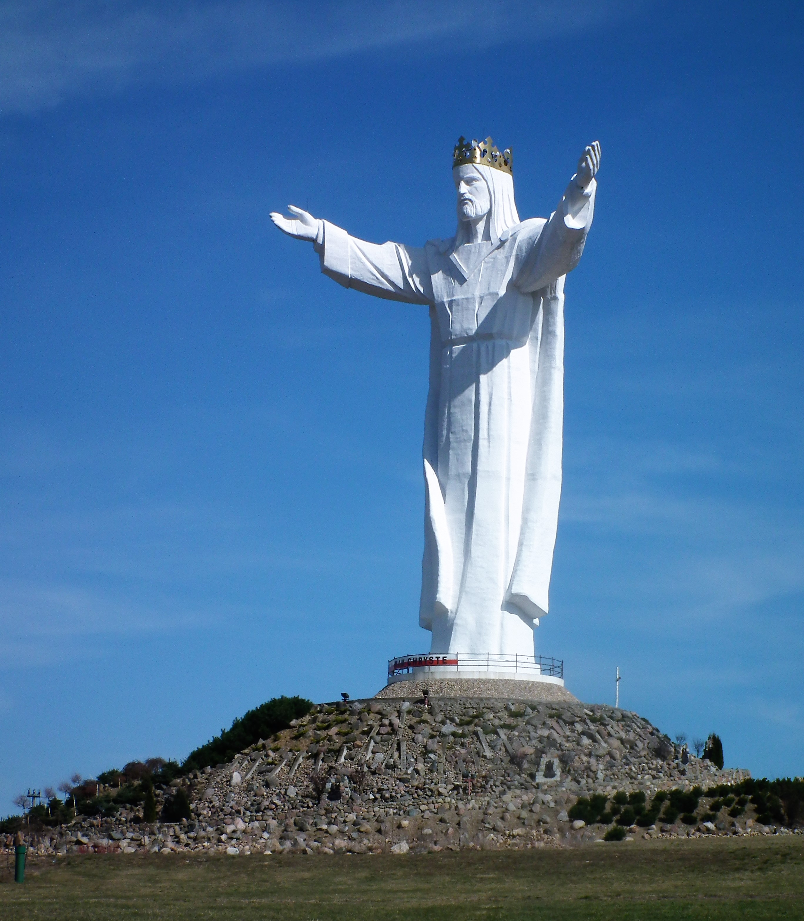 Statua Jezusa w Świebodzinie.